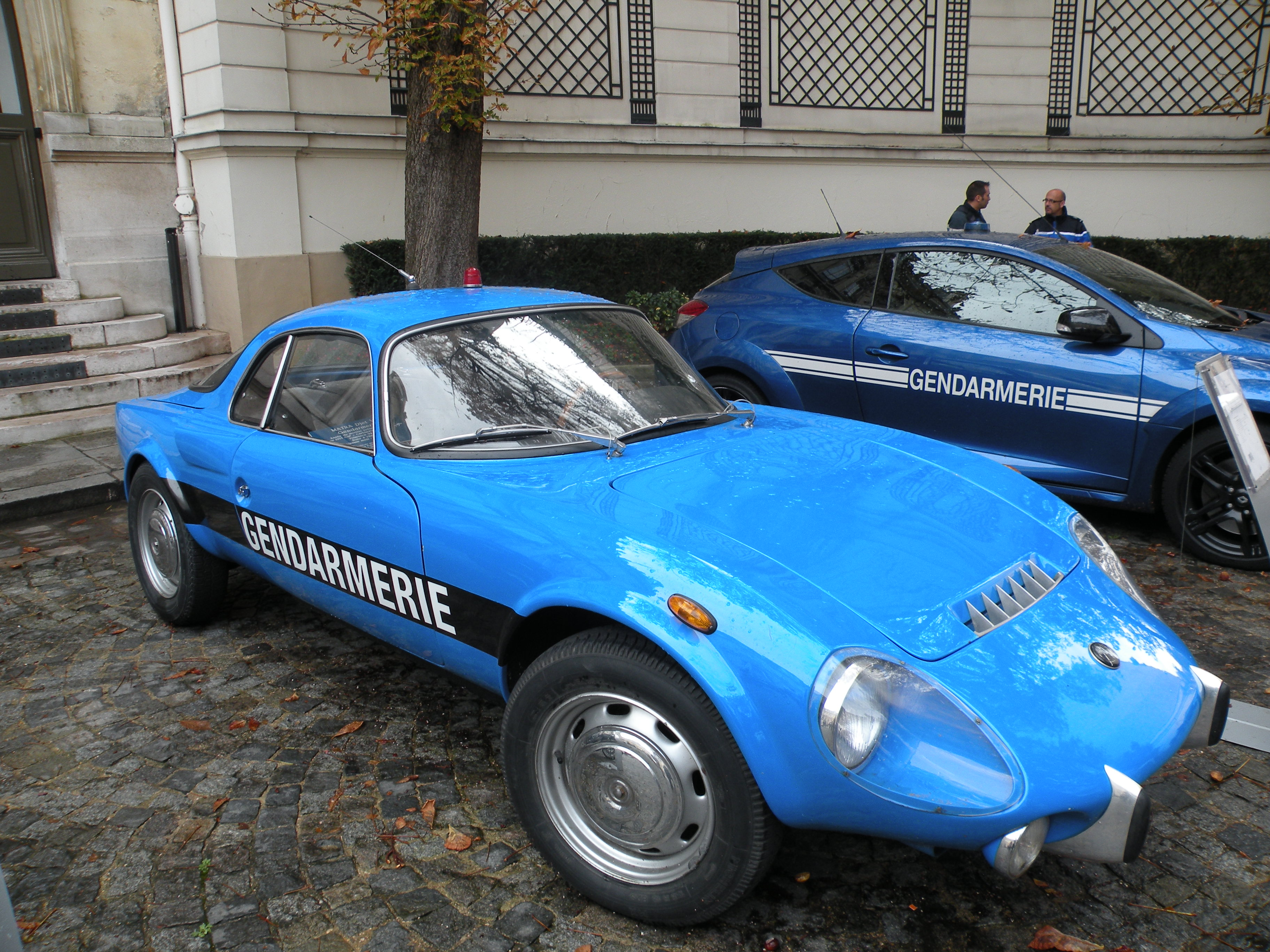 Hôtel de Beauvau exposition des journées du patrimoine